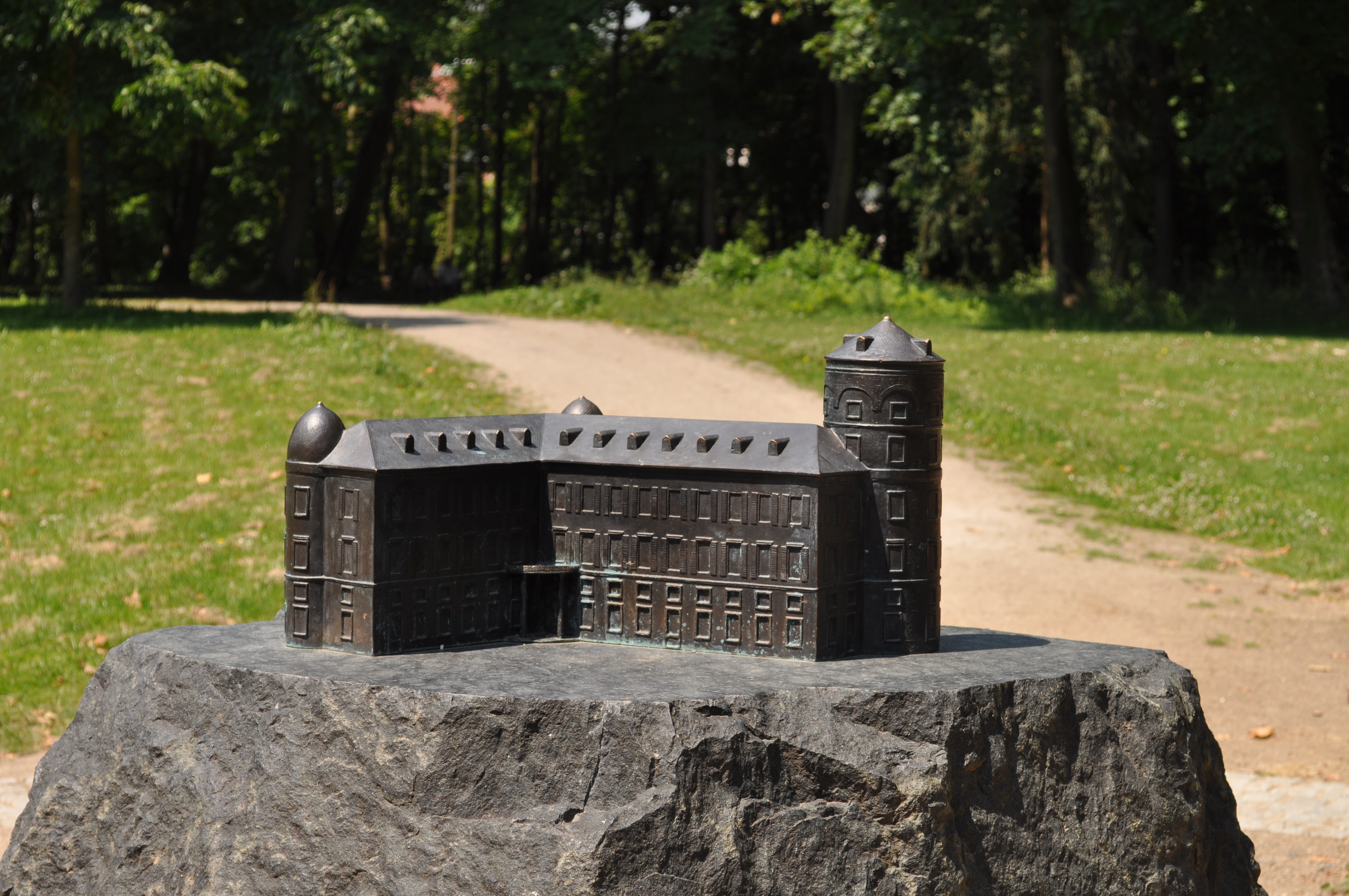 Bronzenachbildung der Burg Rödelheim auf der Nidda-Insel in Frankfurt Rödelheim